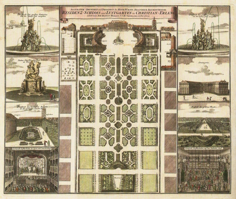 Markgräfliches Schloss und Schlossgarten, Plan von Johann Baptist Homann.